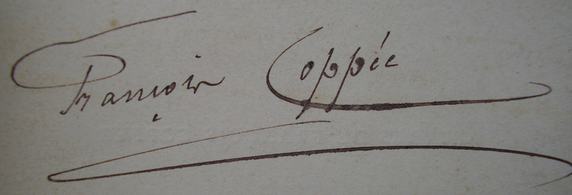 Signature de François Coppée